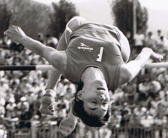 Sandra Dini in azione in una gara iin Italia degli anni ottanta